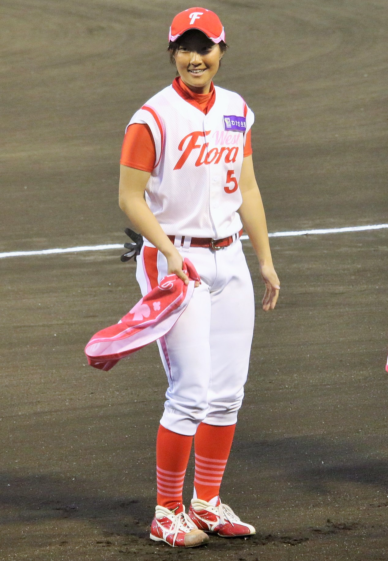 ウエスト・フローラ内野手の田口紗帆。わかさスタジアム京都にて。